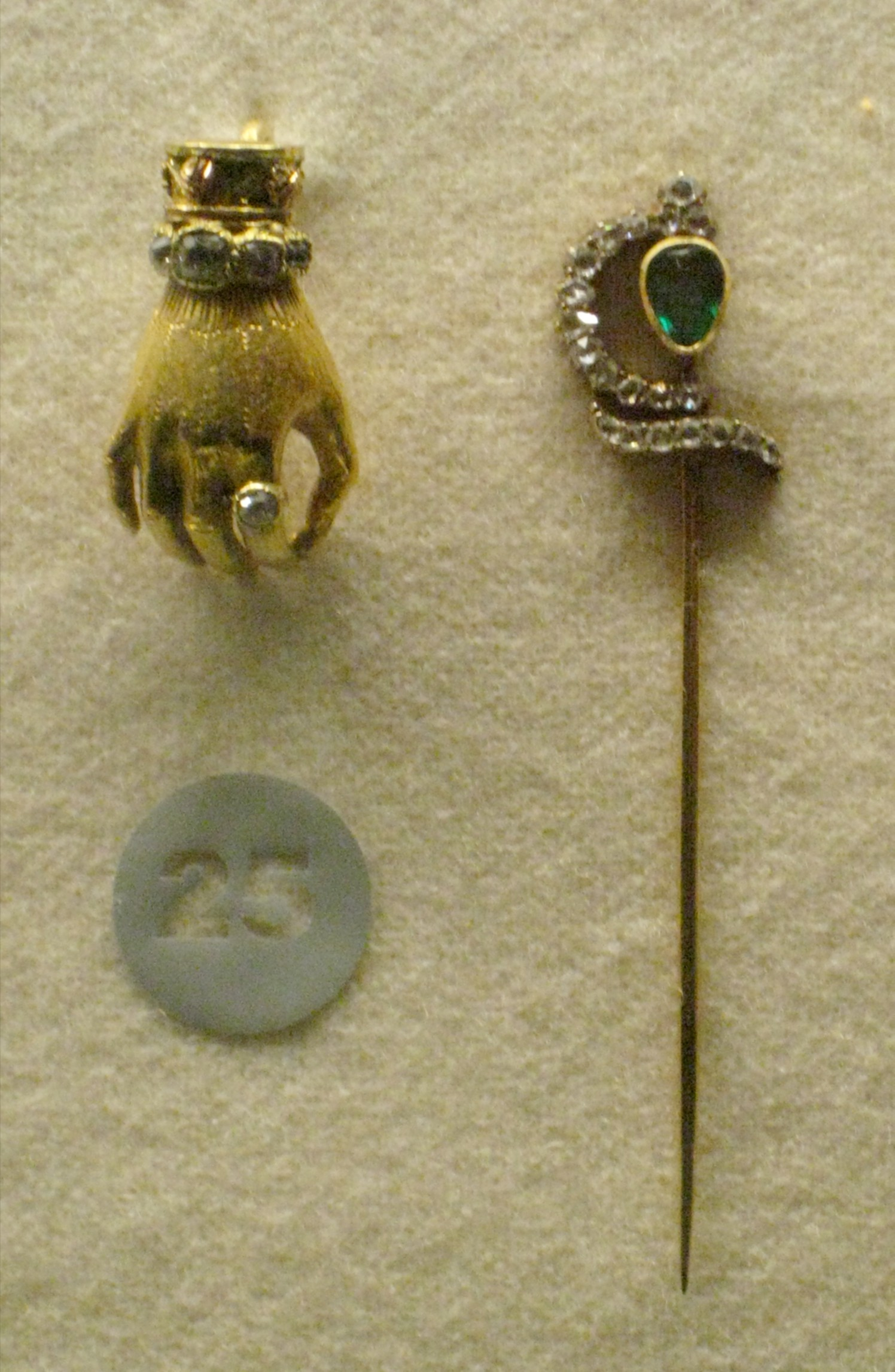 tiepin